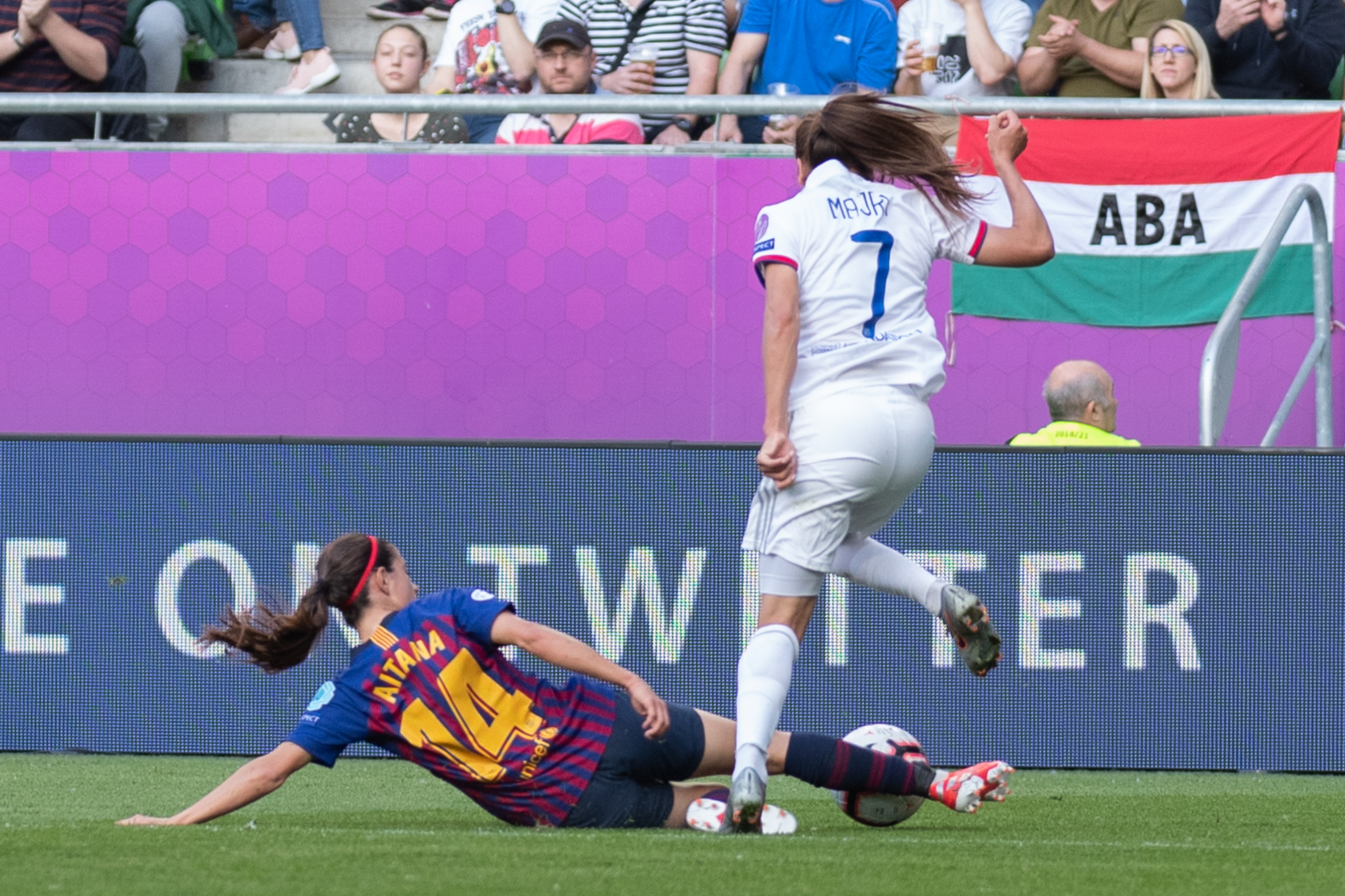 Fußball, Frauen, UEFA Women's Champions League, Olympique Lyonnais - FC Barcelona; v.li.: Aitana Bonmati (FC Barcelona, 14), Amel Majri (Olympique Lyon, 7); Zweikampf, Duell, Aktion, action